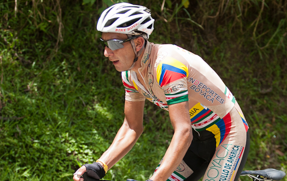 Daniel Rincón, ciclista del equipo colombiano Boyacá Orgullo de América en la Vuelta a Antioquia 2011